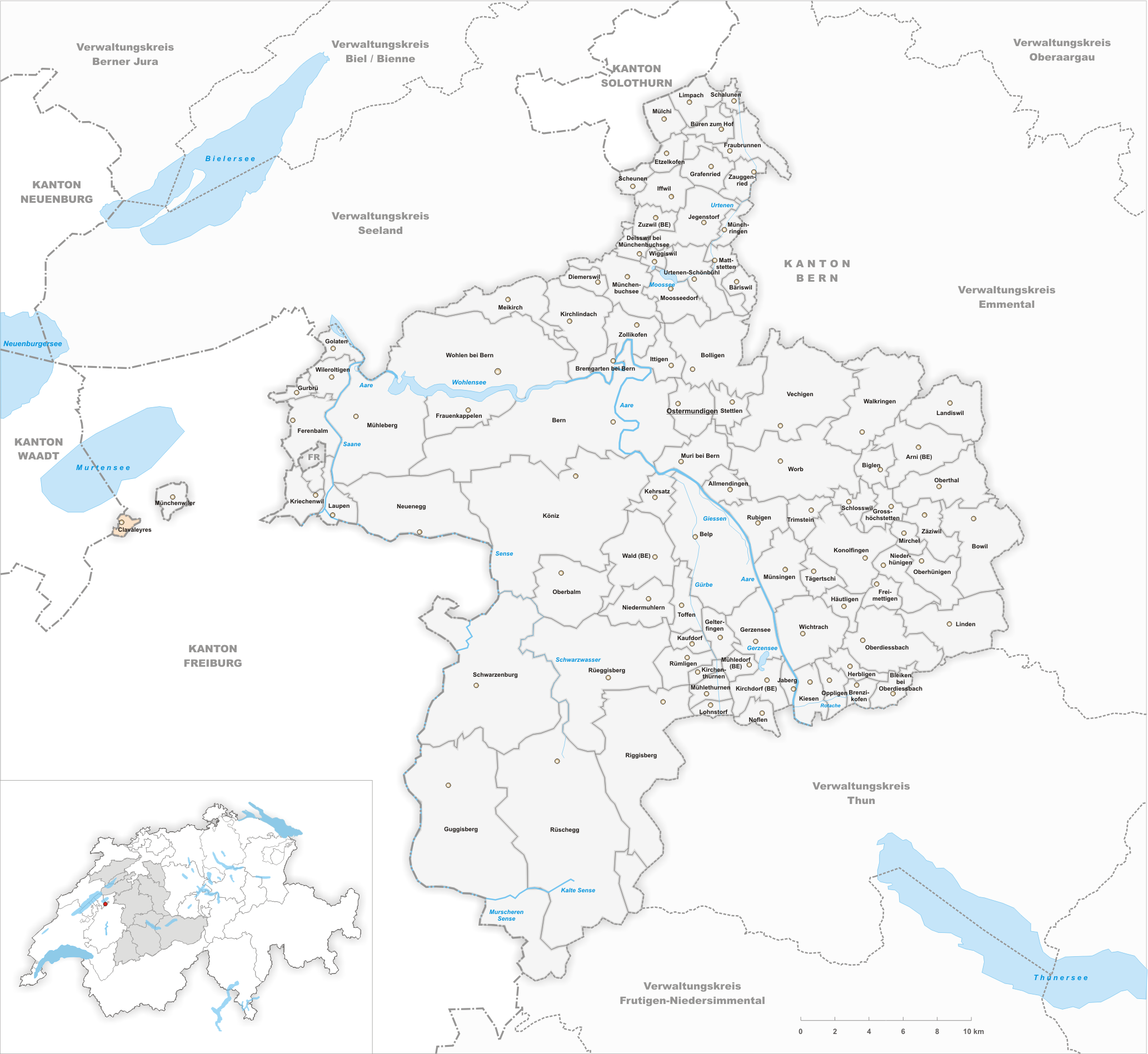 Municipality Clavaleyres